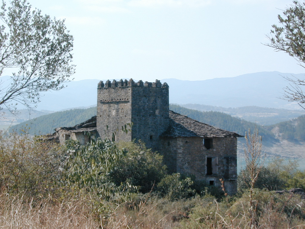 Vivienda adosada a torre defensiva de planta cuadrangular